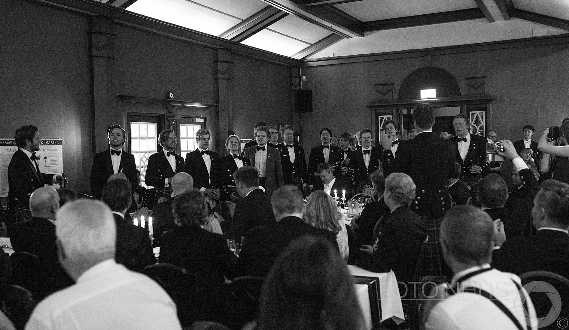 65års-jubileeum på Fløyen